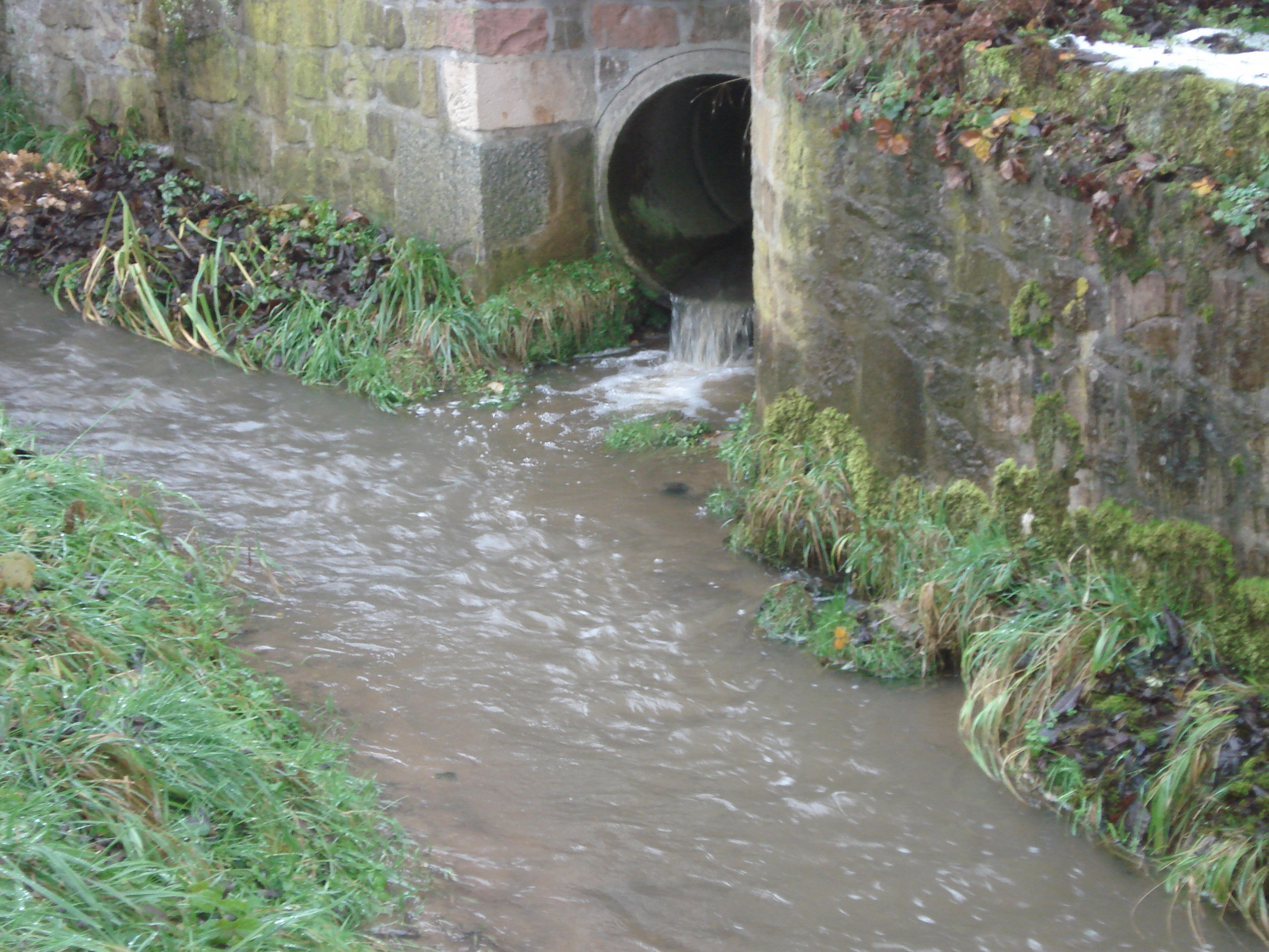 Der Schulzengrundbach (Rohr hinten rechts) mündet in den Westerbach